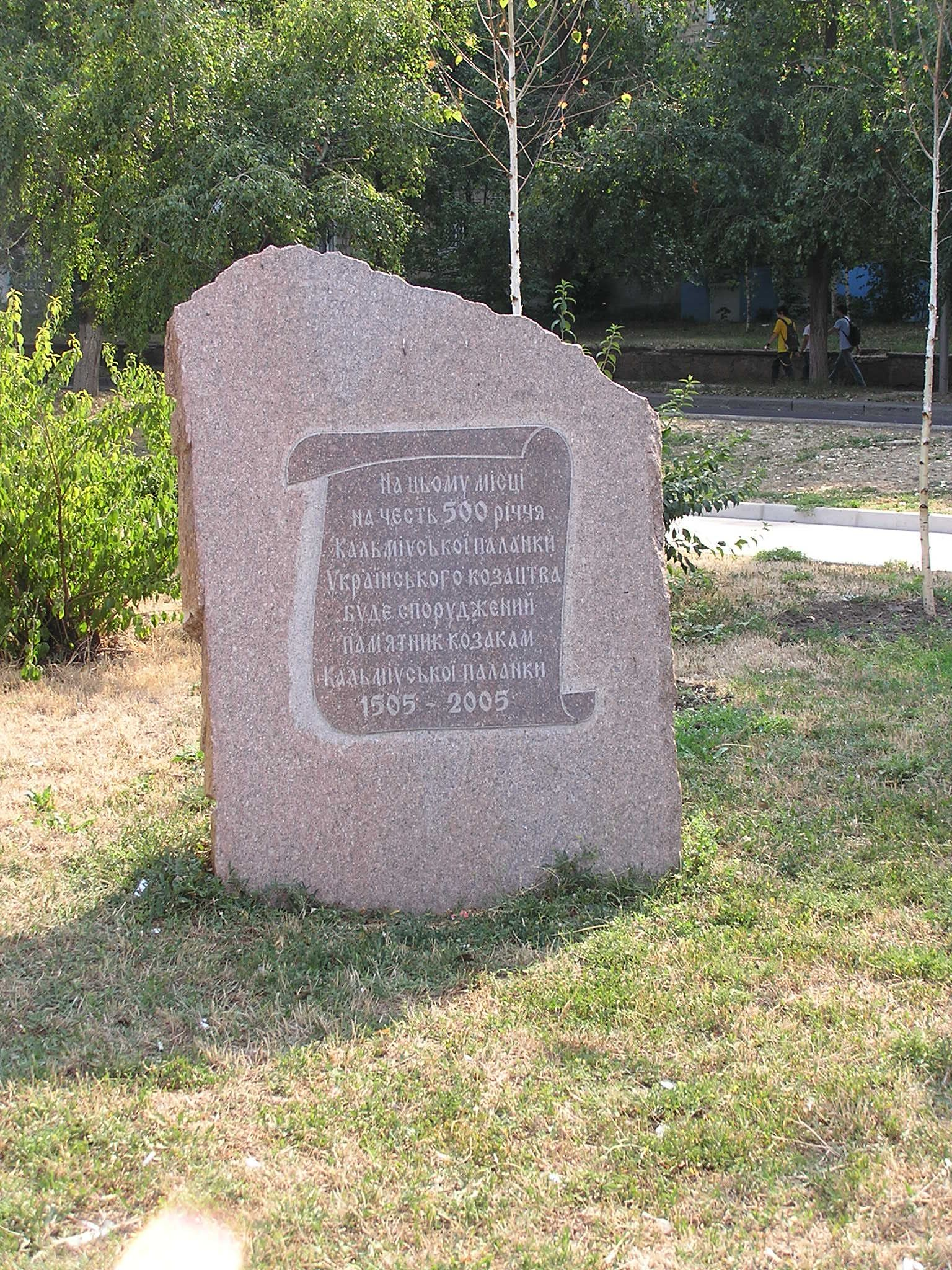 Закладной камень памятника в Донецке в честь 500-летия Кальмиусской паланки